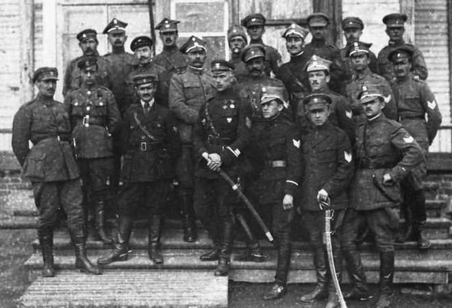 Офицеры 5-ой Дивизии Польских Стрелков, Ново-Николаевск 1919 год. На фото в центре полковник Казимир Румша.